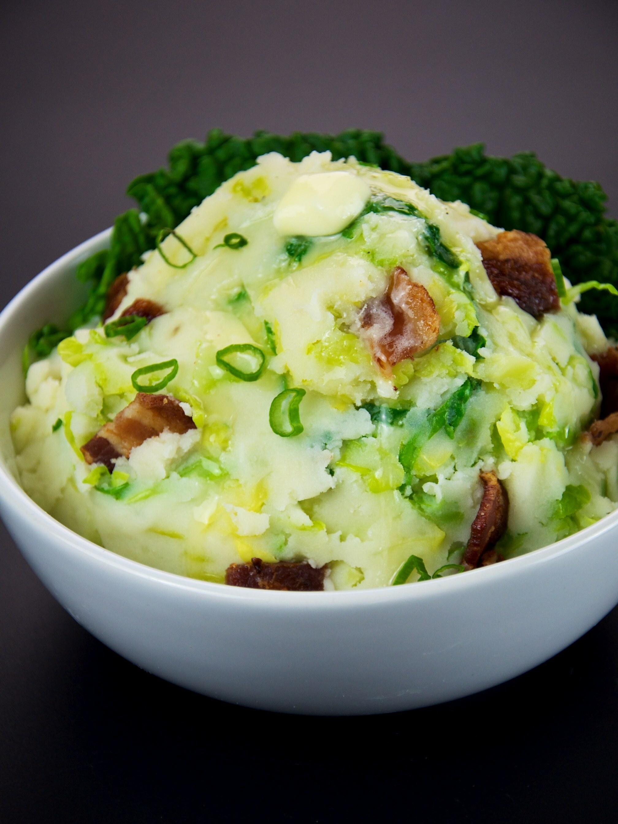 Colcannon